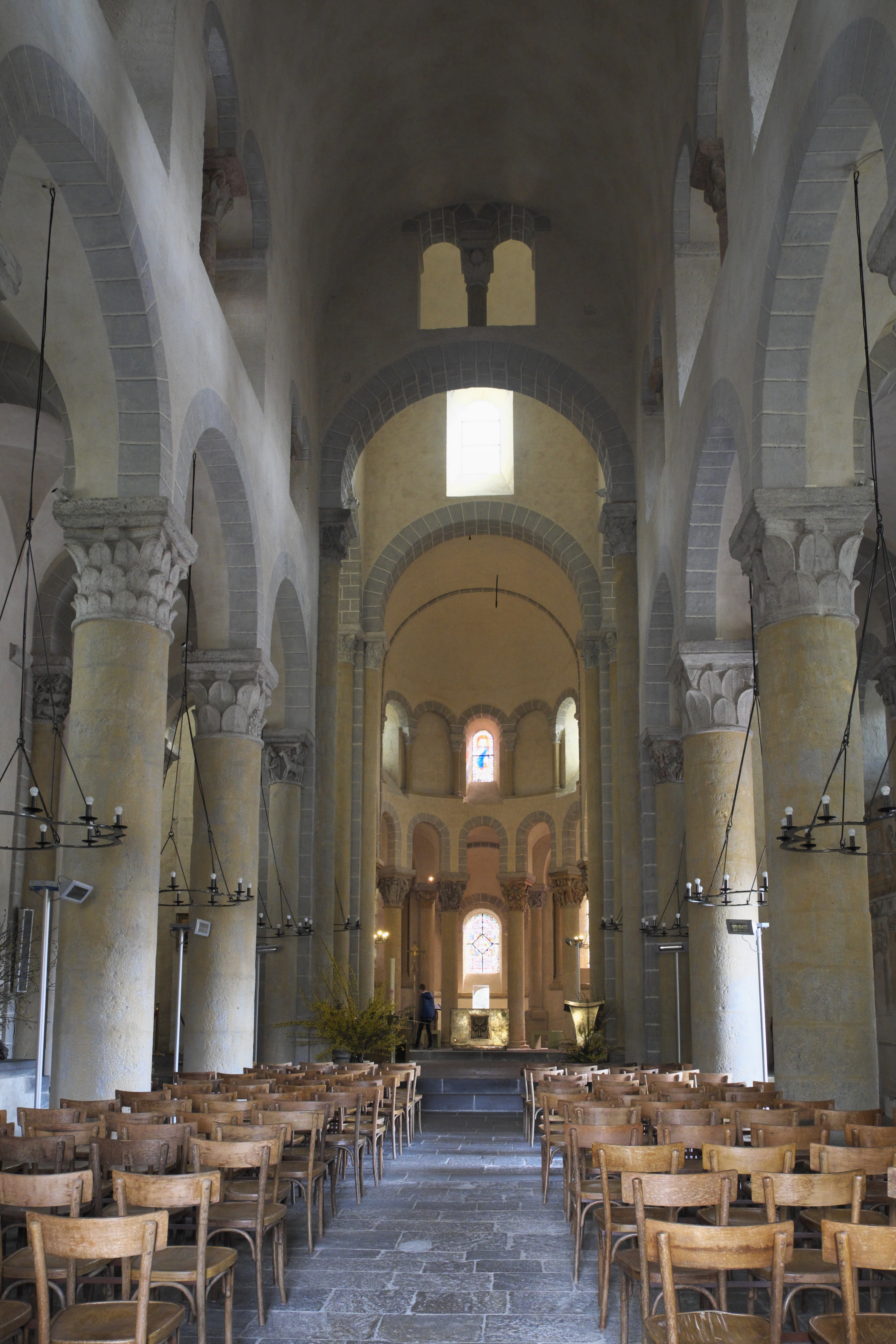 Ehemalige Wallfahrts- und Prioratskirche Saint-Nectaire in Saint-Nectaire im Département Puy-de-Dôme (Auvergne-Rhône-Alpes/Frankreich), Innenraum